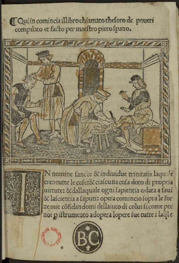 Thesaurus pauperum (italiano). - [Firenze] : [Bartolomeo de' Libri], [circa 1500]. - 94 c. ; a-z⁴, &² ; 8°.